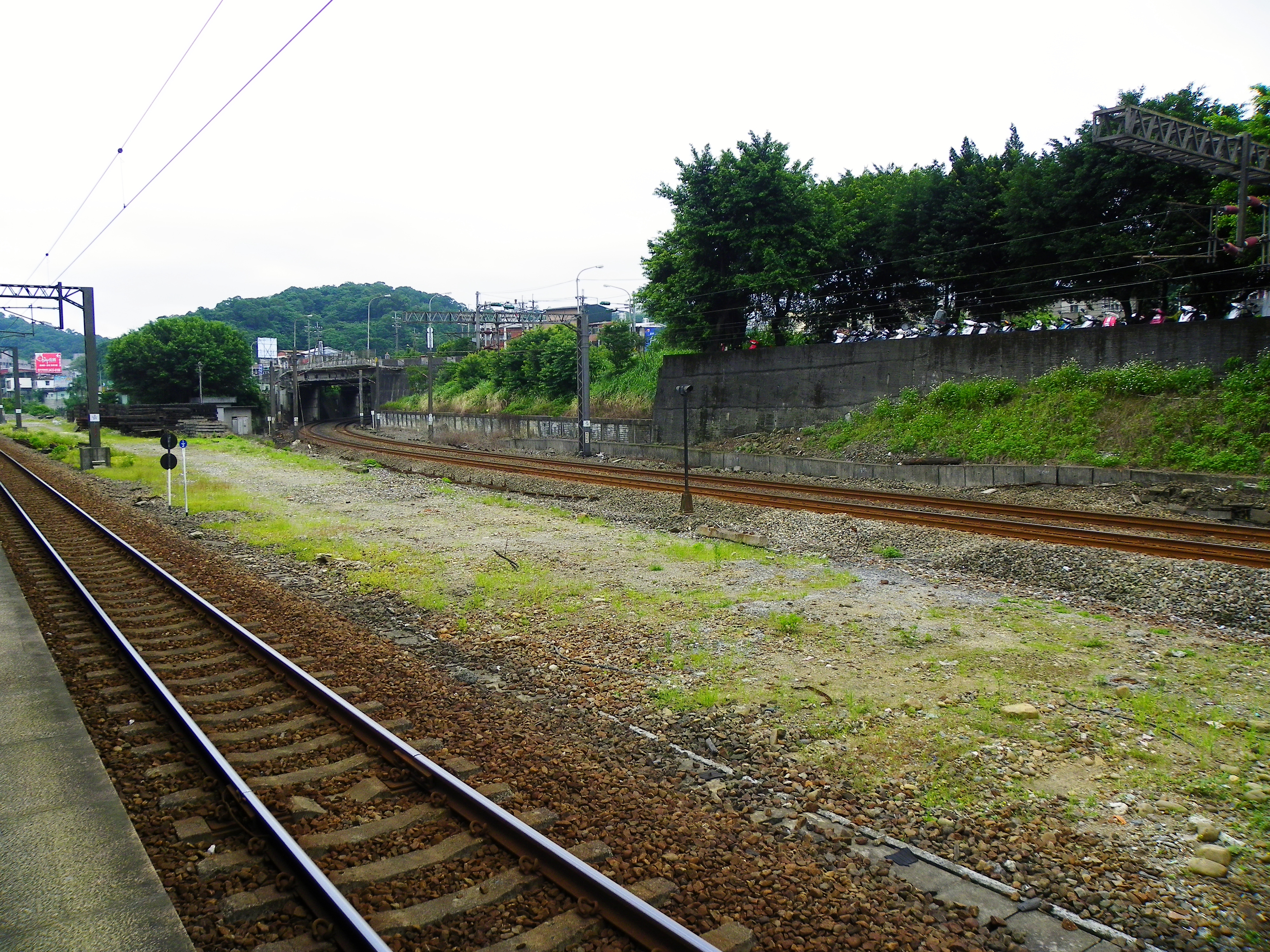 由八堵車站第三月臺北側，東望前方往三坑車站的縱貫線與遠方往暖暖車站的宜蘭線分歧。